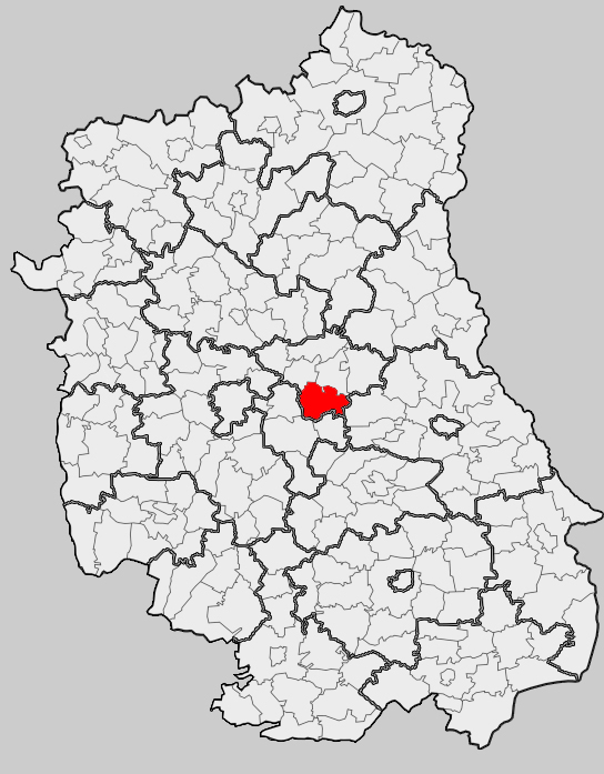 Map of gmina Milejów, Łęczna county, Lublin voivodship Mapa gminy Milejów, powiat łęczyński, województwo lubelskie